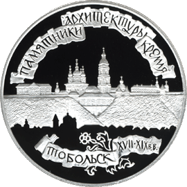 Памятная серебряная монета Банка России, серия "Памятники архитектуры России", 1996 год, номинал 3 рубля. Реверс.